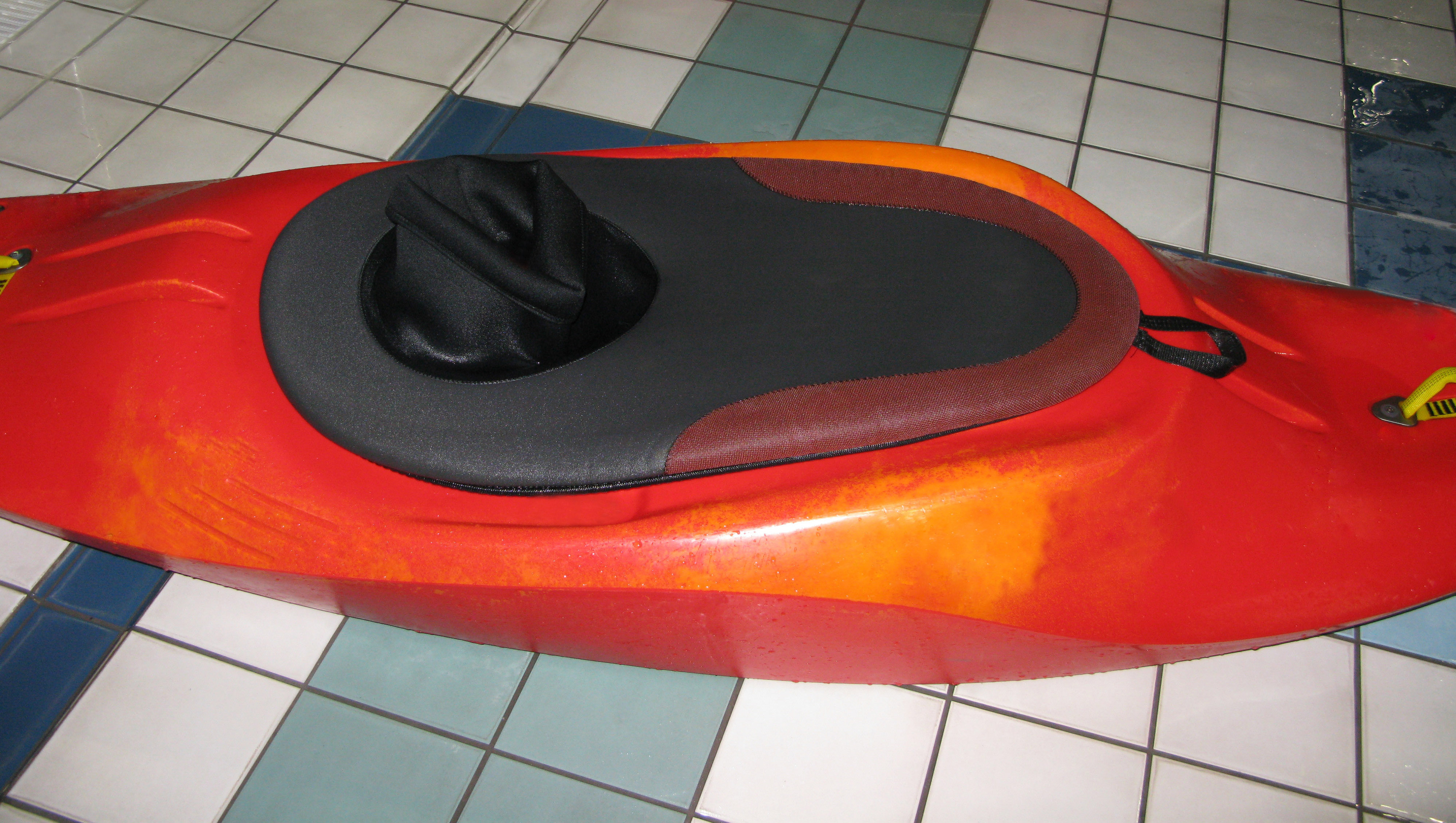 Fartuch neoprenowy na kajaku do Freestyle'u